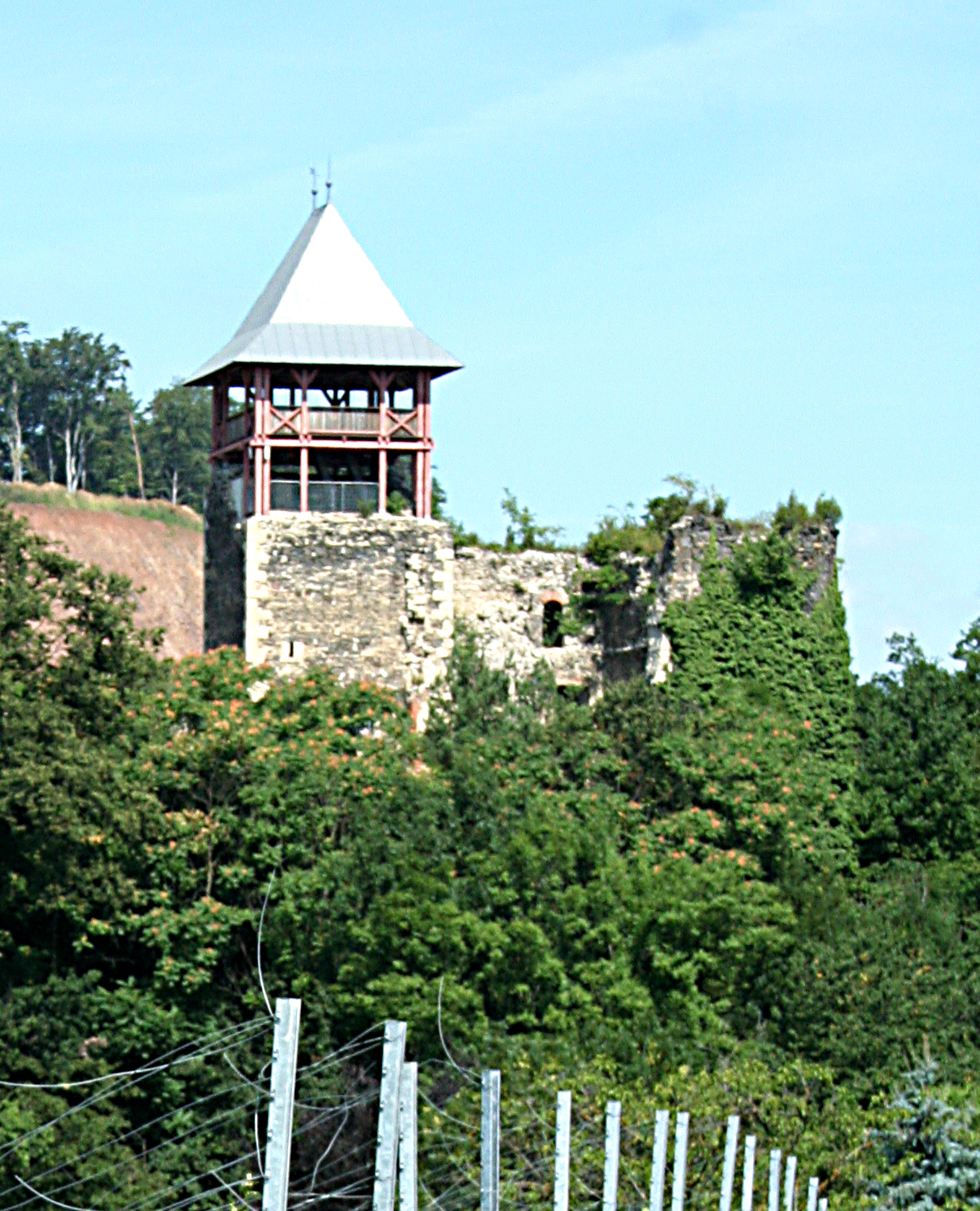 Burgruine Hohenwarth, Klöch